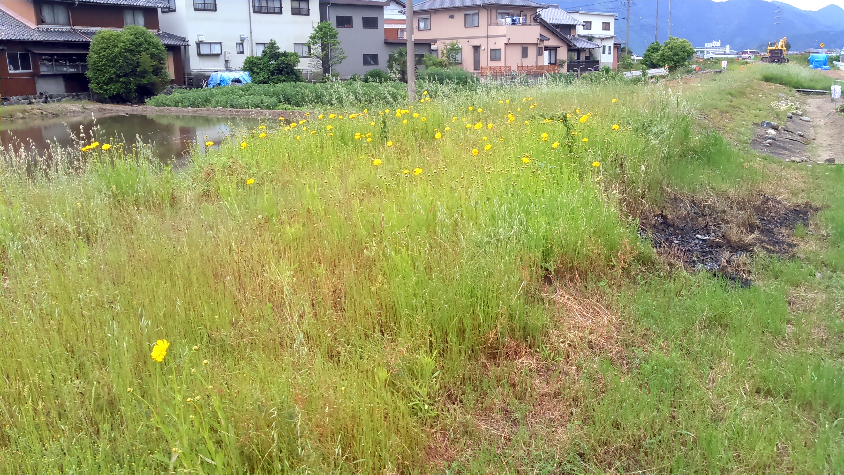 付近の県道整備により、重機は見られる。再検証により東側ではないことが判明。